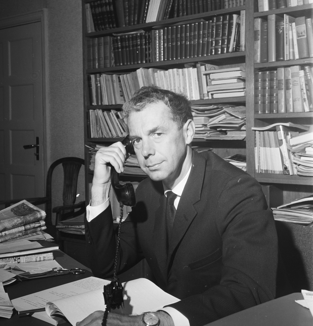 Tormod Skagestad var en norsk dramaturg, lyriker, forfatter og teaterpolitiker.